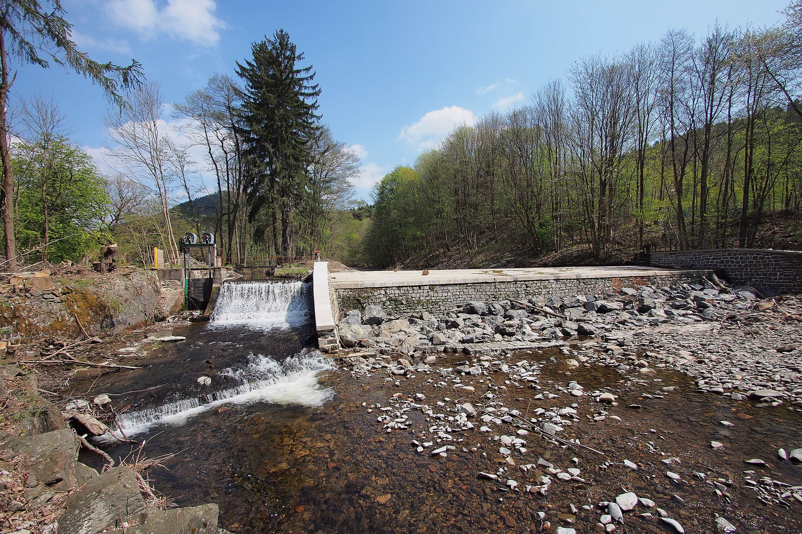 Sieberwehr kurz vor Herzberg